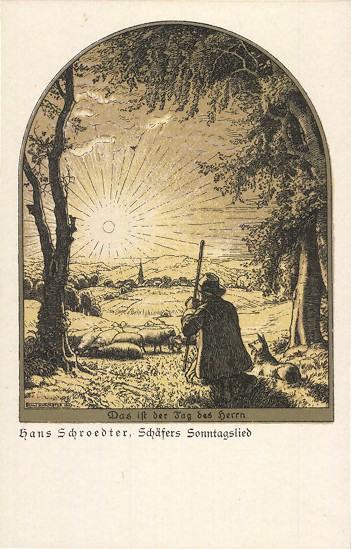 Lithographie Schäfers Sonntagslied, Postkarte